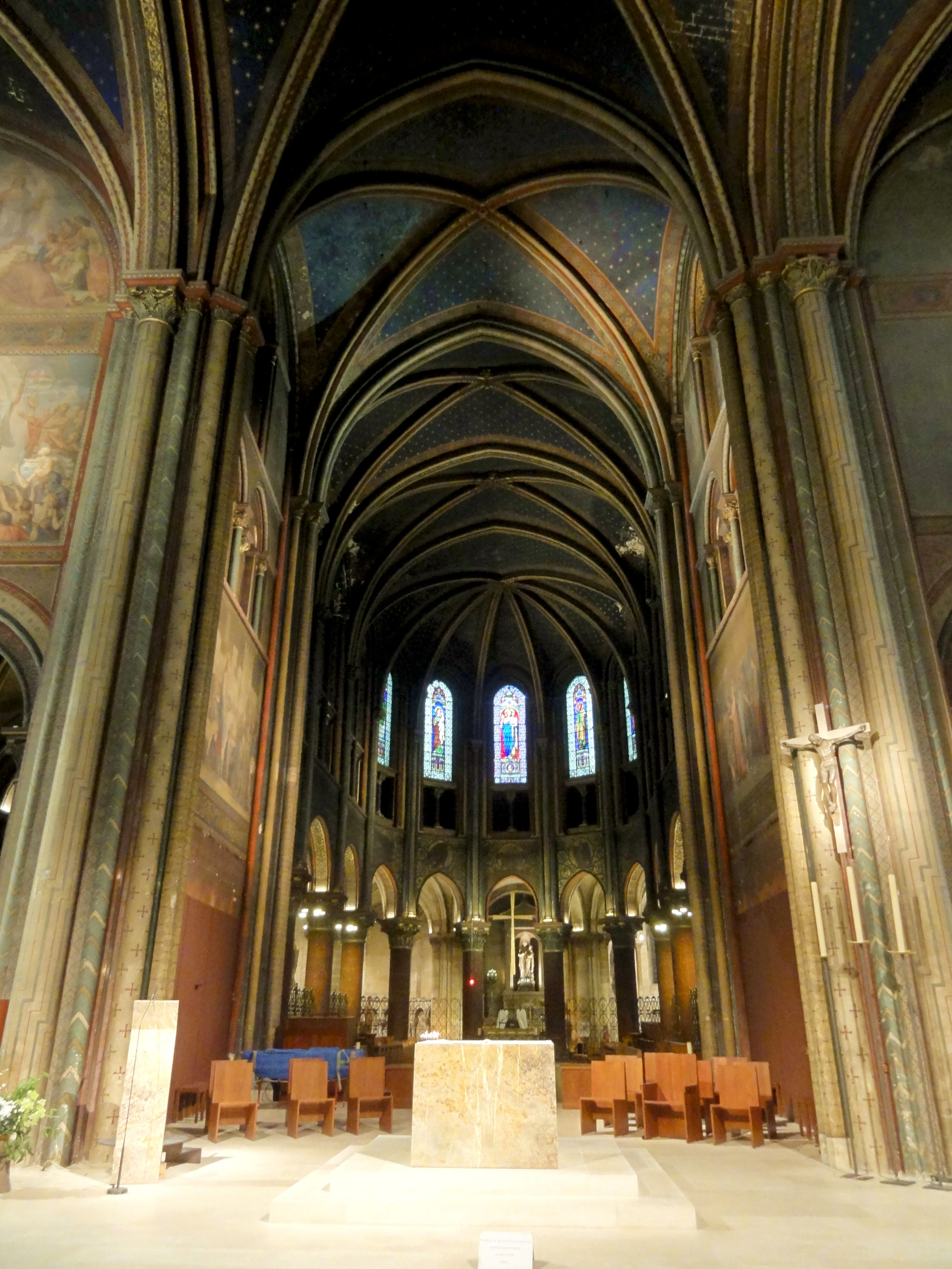 Croisée, vue vers l'est.